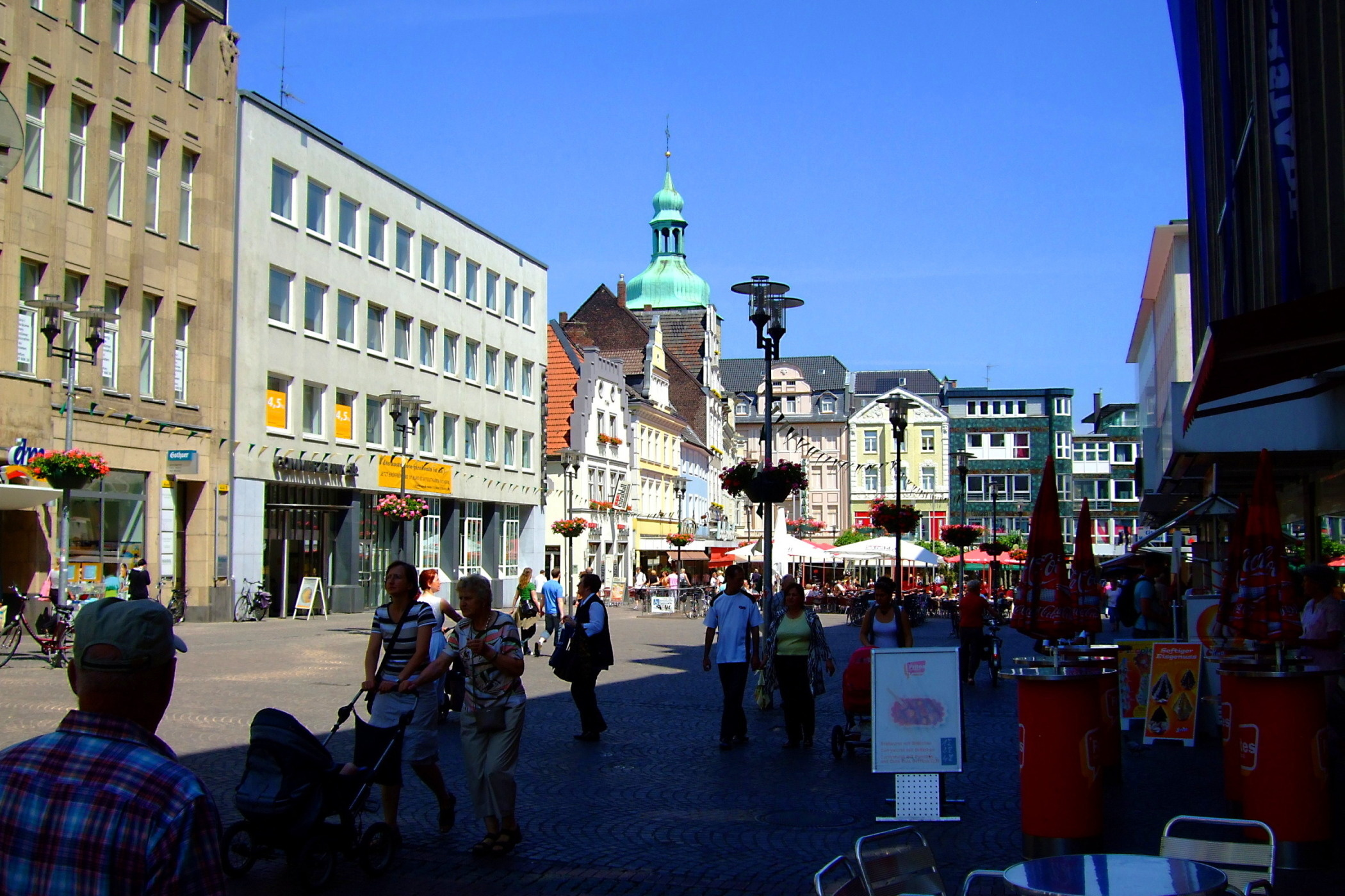 Markt, (NICHT der "Alte Holzmarkt") in Recklinghausen (NRW)